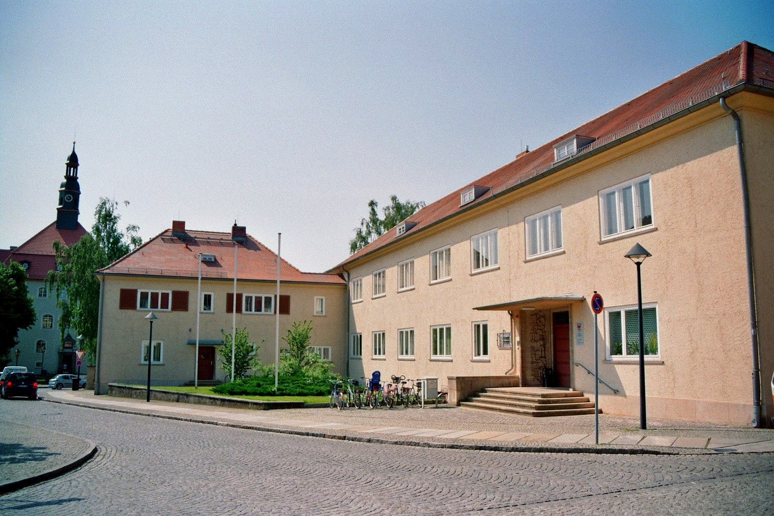 Amtsgericht Lübben in Lübben, Landkreis Dahme-Spreewald, Brandenburg, Deutschland. Das Gebäude steht unter Denkmalschutz.